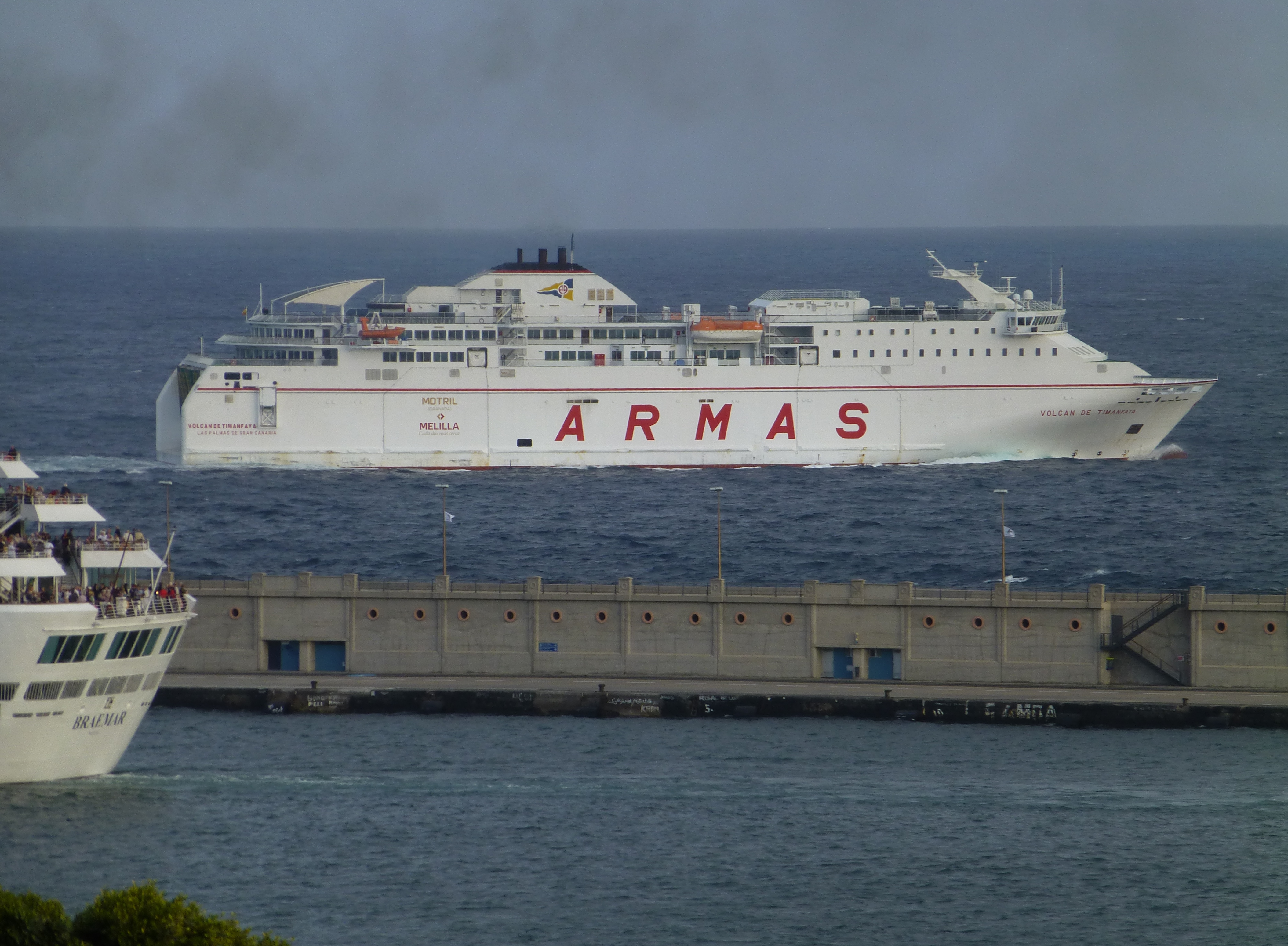 El buque tipo ferry "Volcán de Timanfaya", de la naviera Armas, navegando frente al puerto de Santa Cruz de Tenerife (Islas Canarias, España), fotografiado el día 14 de enero de 2013. Este ferry está actualmente dedicado a la navegación interinsular de Canarias, en líneas regulares. Entró en servicio en 2004. Su eslora es de 143 metros. Velocidad de servicio: 23 nudos. Puerto de matrícula: Las Palmas de Gran Canaria. Bandera española.